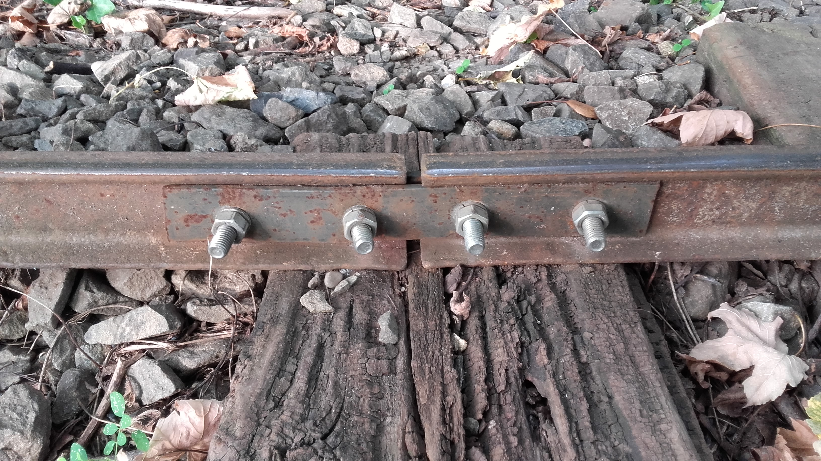 A vágánymezőket 16mm furat átmérőjű hevederekkel rögzítették egymáshoz